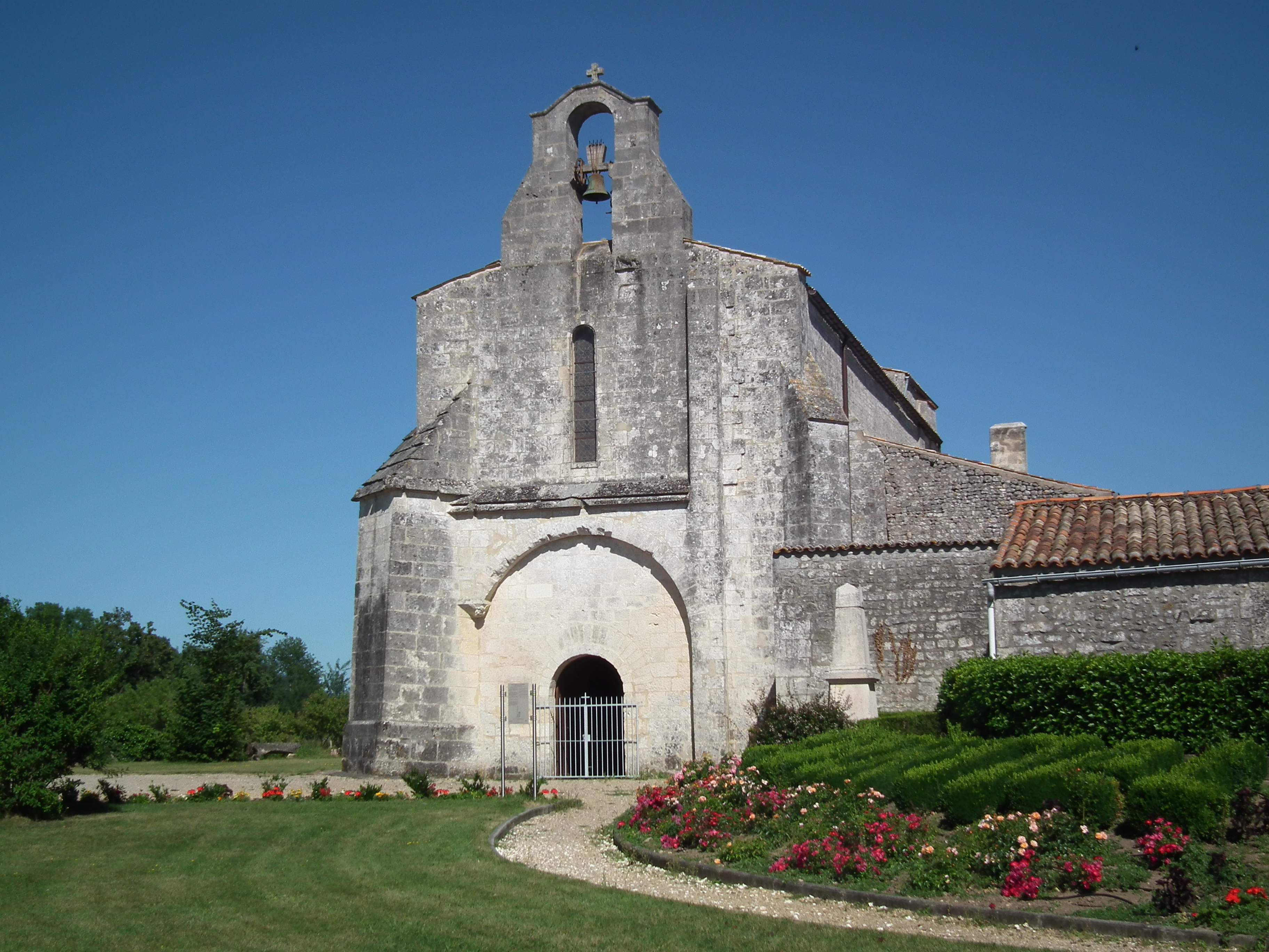 L'église romane de Saint-Martial-de-Vitaterne